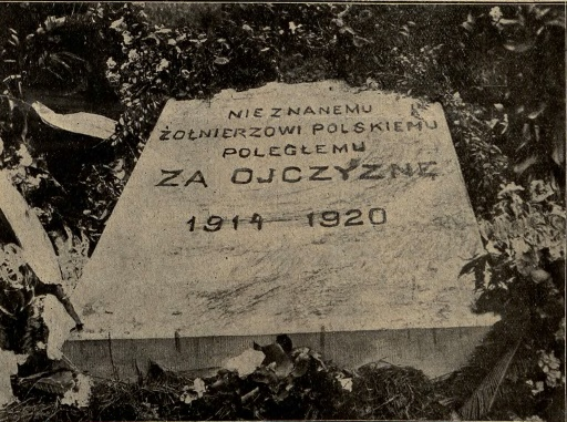 Płyta poświęcona nieznanemu żołnierzowi złozona w tym miejscu 14 czerwca 1925 roku..